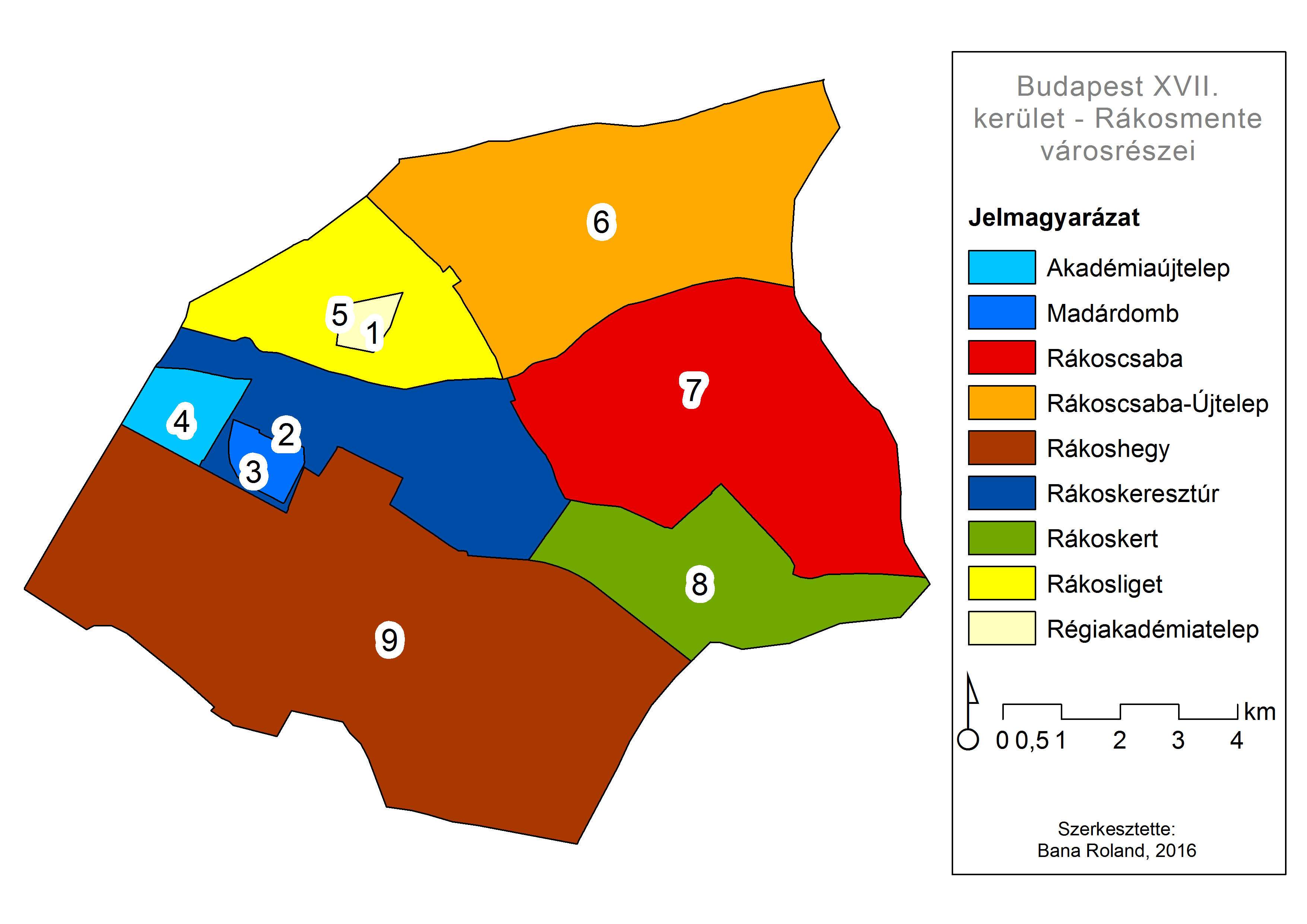 Budapest XVII. kerület - Rákosmente városrészeinek áttekintő térképe.